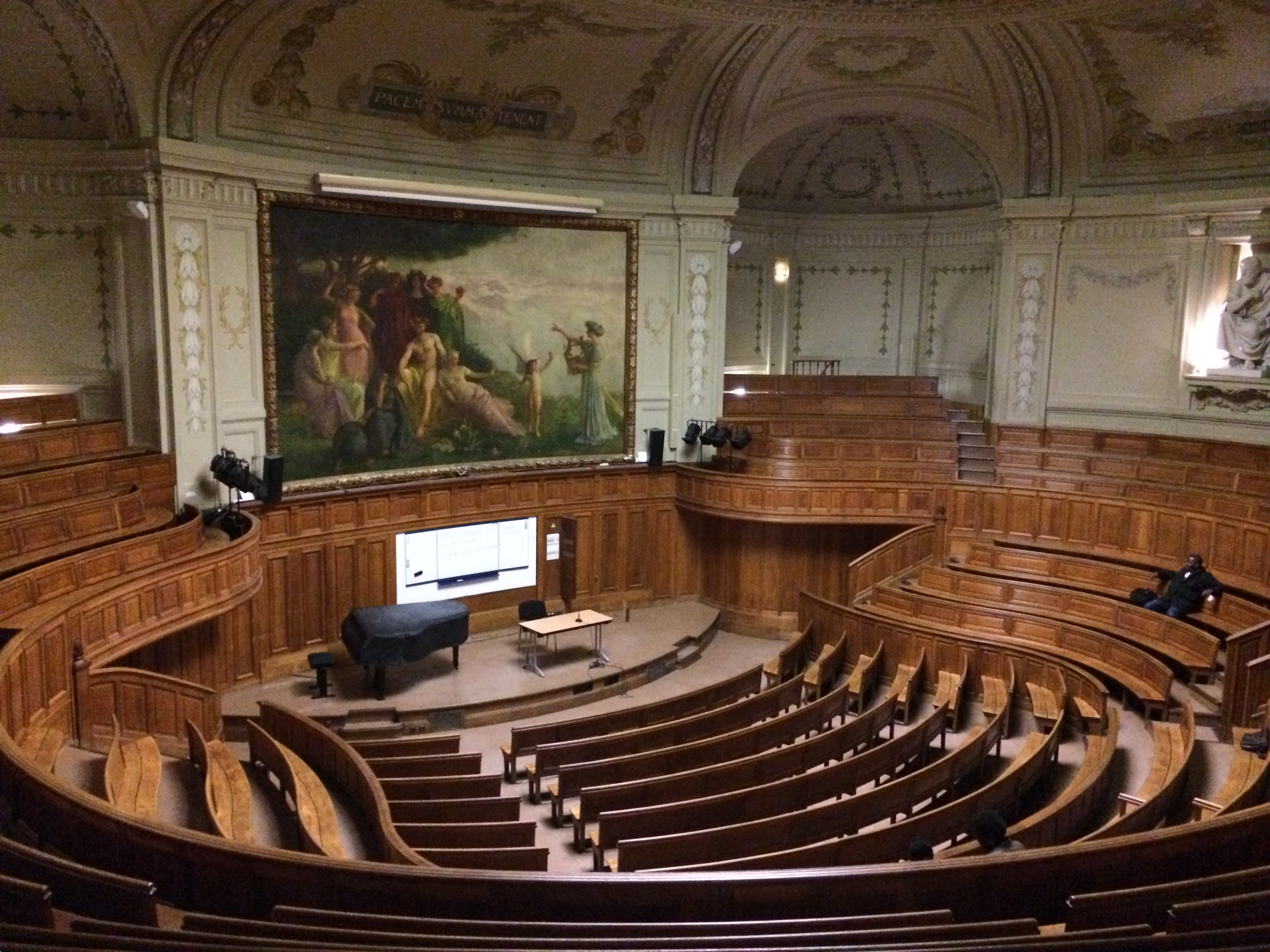 Sorbona